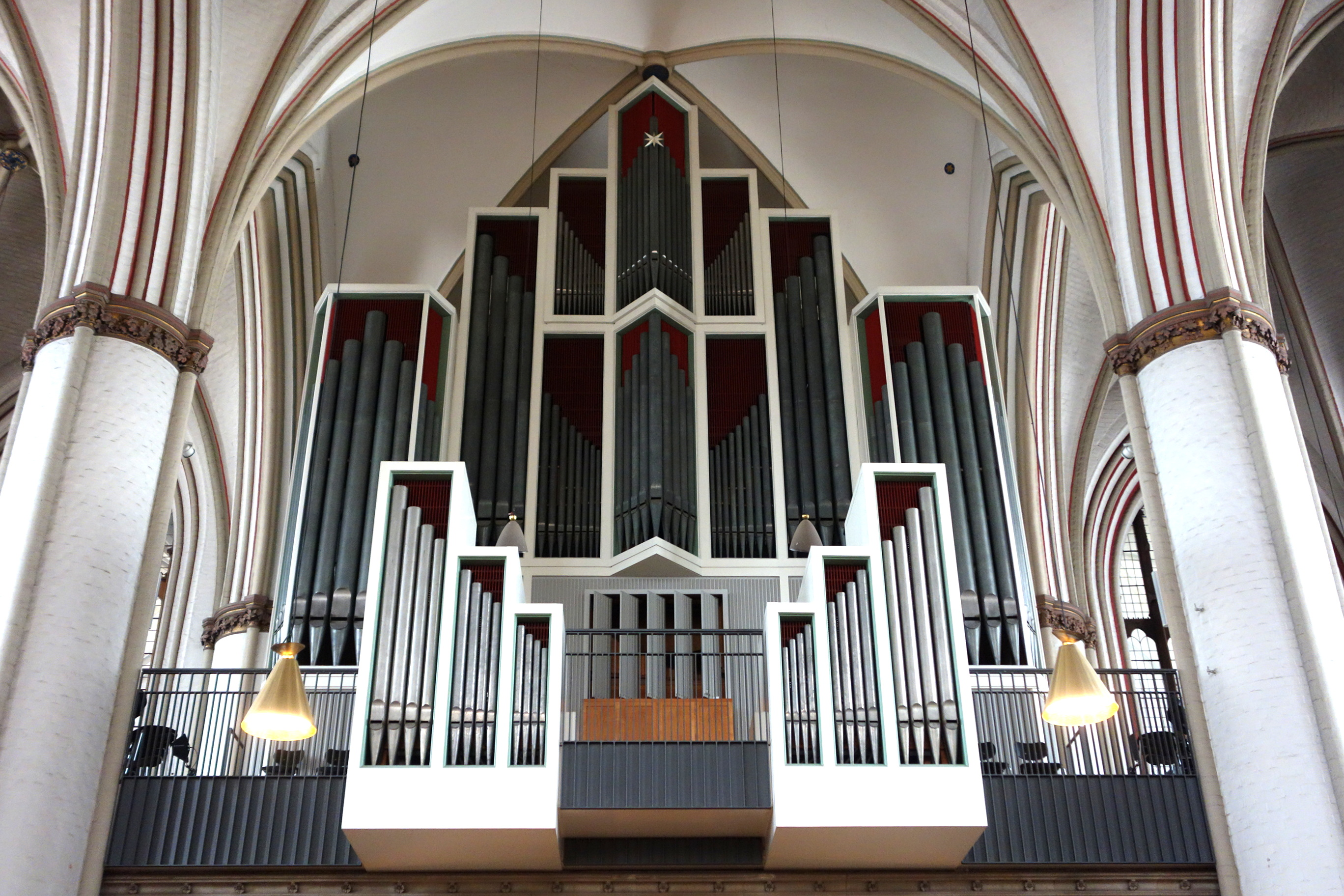 Orgel in St. Petri, Hamburg, Deutschland